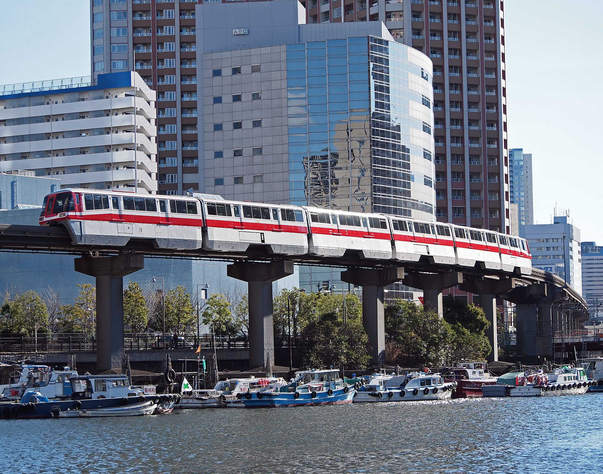 東京モノレール1000形・第9編成(1049F)によるヒストリートレイン。2014年に500形風復刻塗装が施された。 浜松町 - 天王洲アイル間、芝浦アイランド付近にて撮影